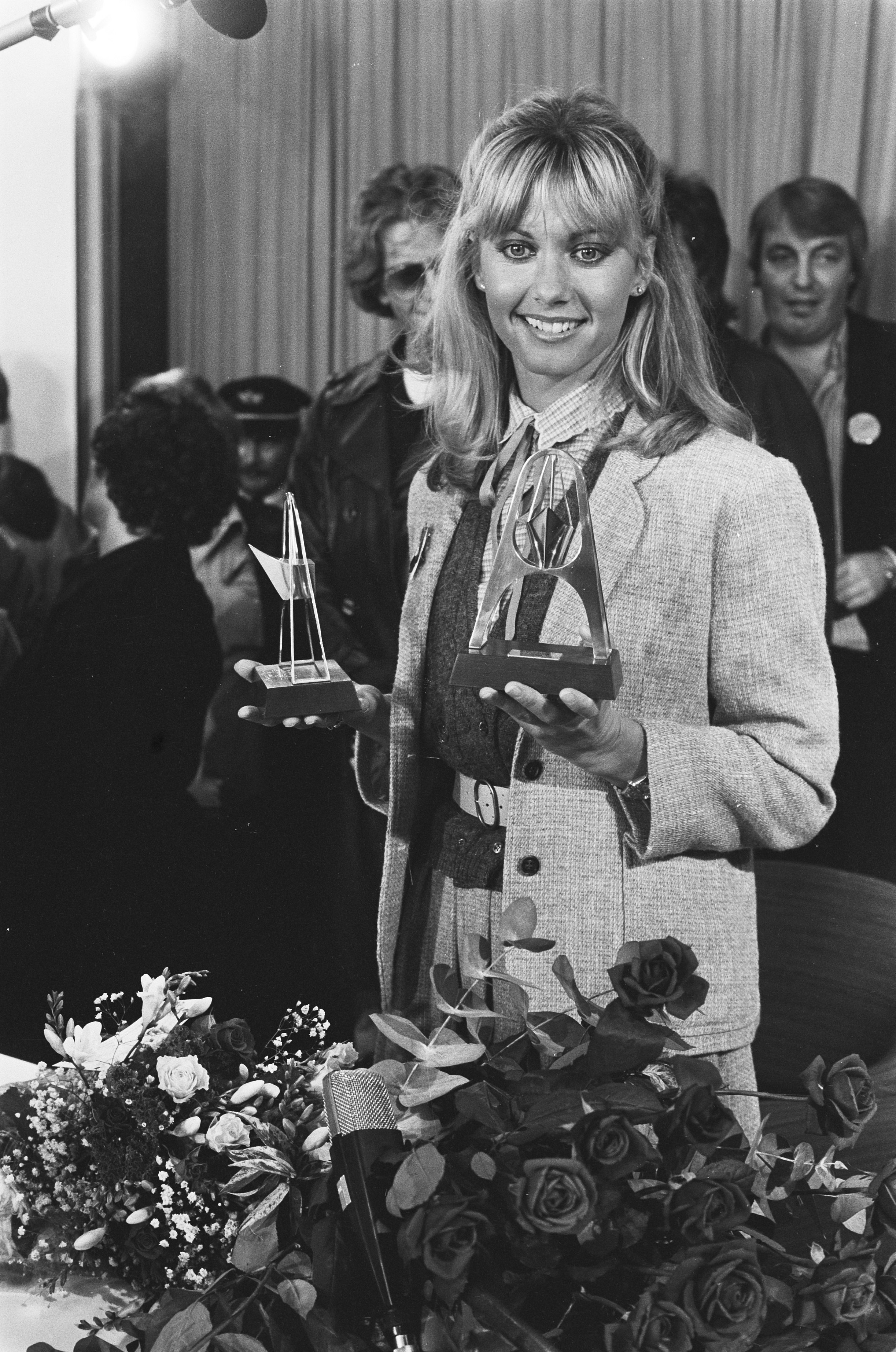 Collectie / Archief : Fotocollectie Anefo Reportage / Serie : [ onbekend ] Beschrijving : Aankomst zangeres Olivia Newton John op Schiphol; Olivia Newton John in de perskamer Datum : 24 november 1978 Trefwoorden : aankomsten, zangeressen Persoonsnaam : Newton John, Olivia Fotograaf : Verhoeff, Bert / Anefo Auteursrechthebbende : Nationaal Archief Materiaalsoort : Negatief (zwart/wit) Nummer archiefinventaris : bekijk toegang 2.24.01.05 Bestanddeelnummer : 930-0132